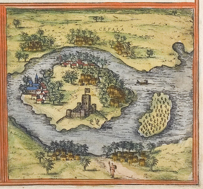 Sofala